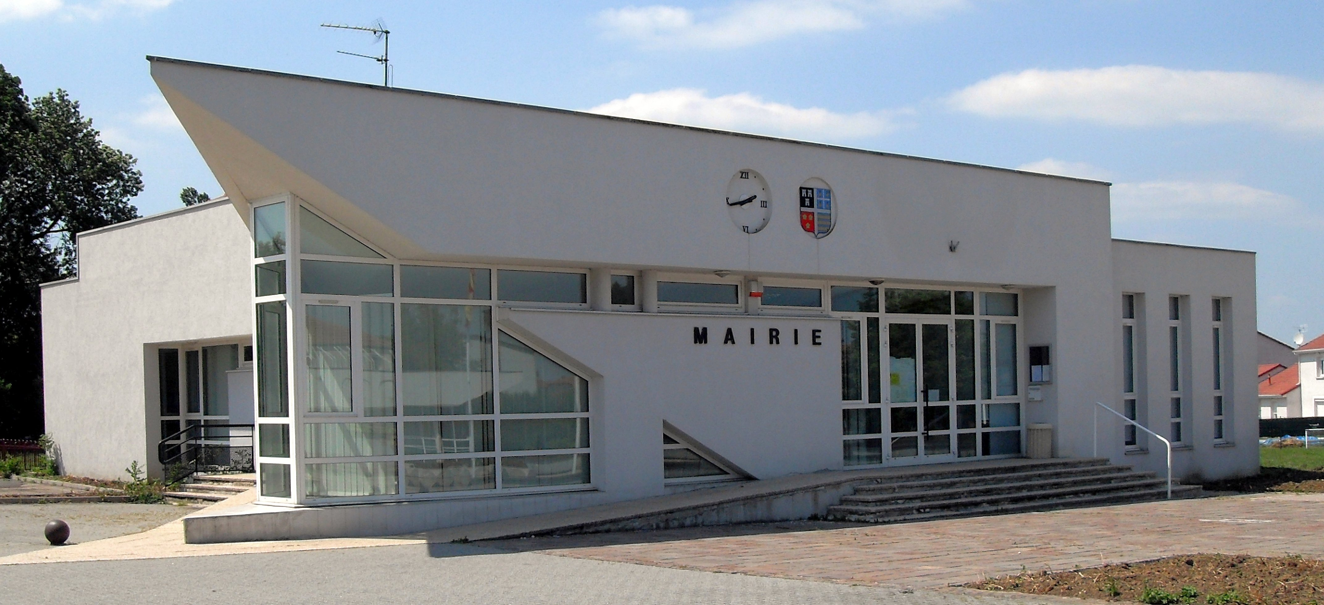 La mairie de Gironcourt-sur-Vraine